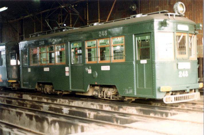 京都から購入したモ２５１形がイマイチだったため、急遽、 廃車予定車から状態のいい物を選び３両をワンマンカーに改造した。